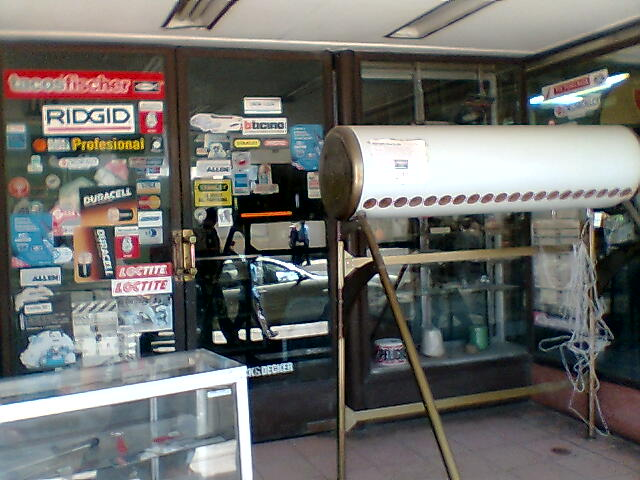 Xhuquicamat el dia de su despedida